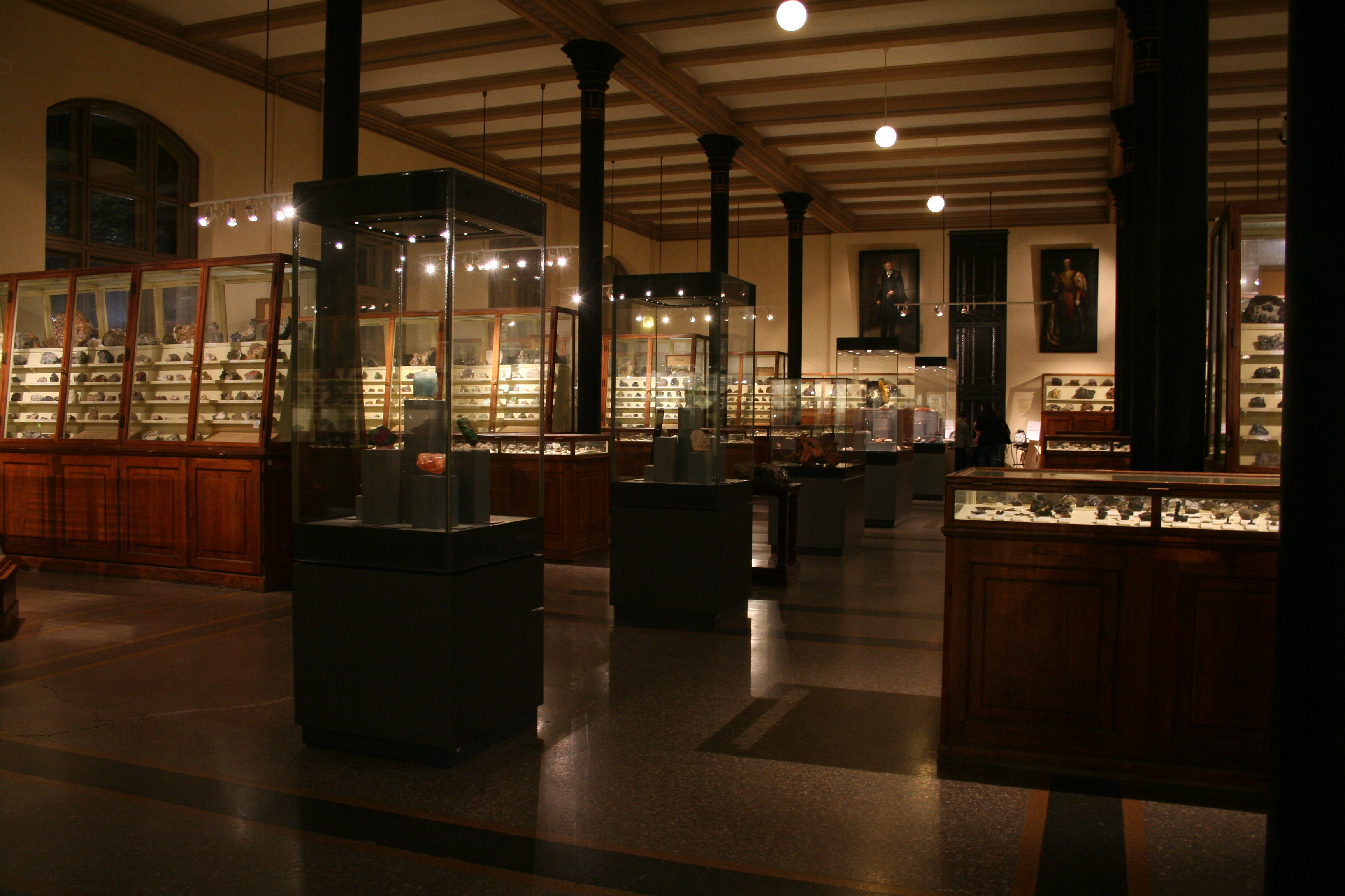 Der Mineraliensaal im Naturkundemuseum Berlin